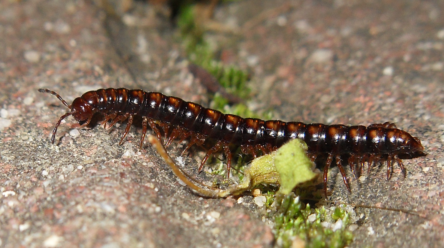 Strongylosoma stigmatosum